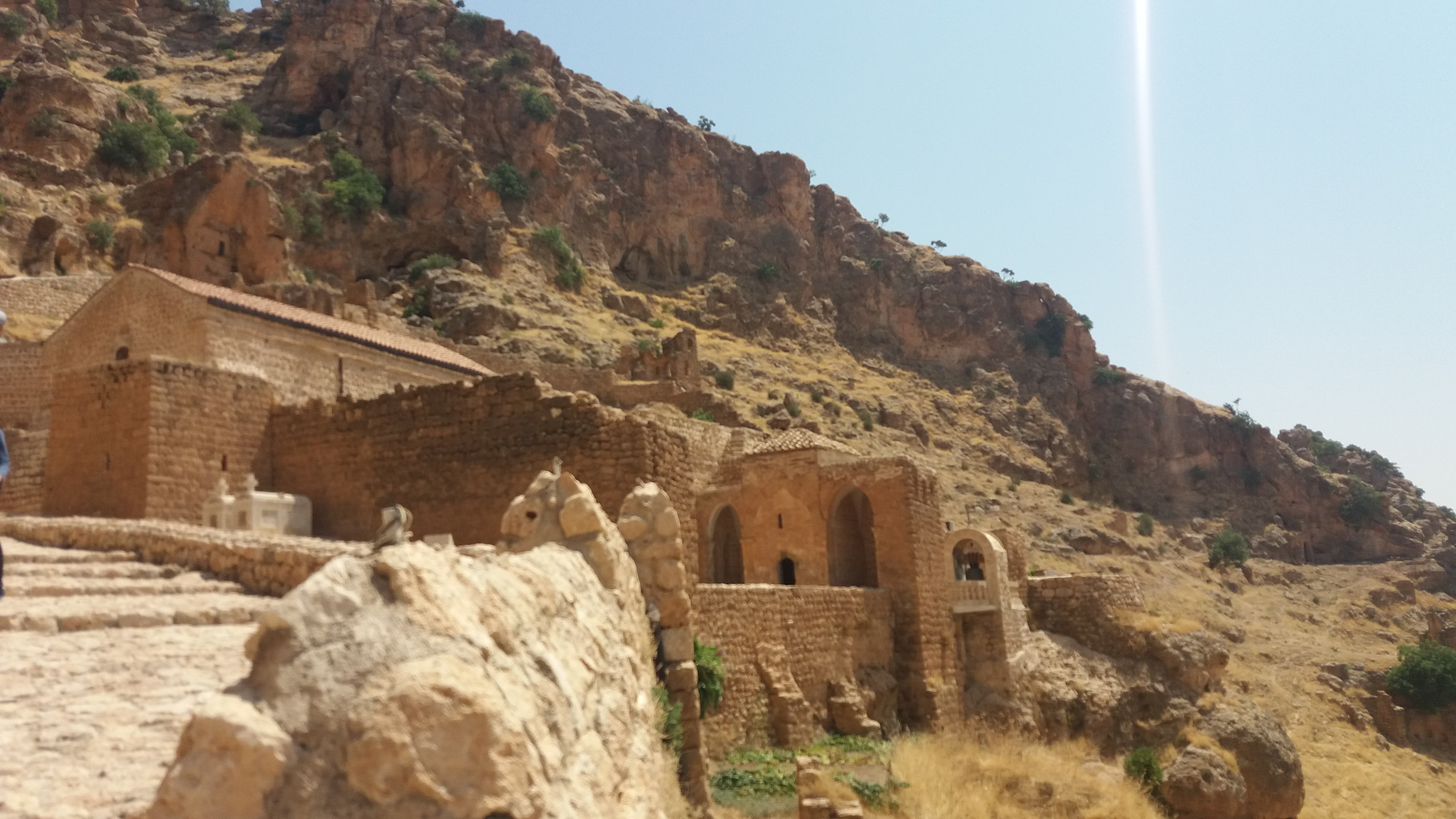 Zu sehen ist das Kloster Mor Augin aus westlicher Richtung